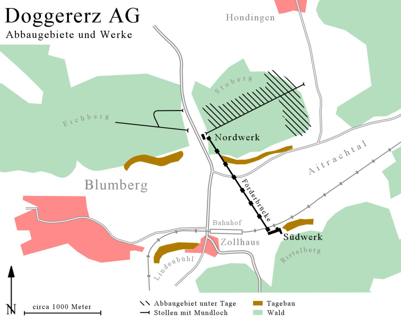 Abbaugebiete und Werksanlagen der Doggererz AG bei Blumberg. Kartengrundlage: Gustav Albiez: Eisenerz-Bergbau in Blumberg. In: Schriften des Vereins für Geschichte und Naturgeschichte der Baar. 1974 (30), ISSN 0340-4765, S. 170–200, hier Abb. 1, S. 177.